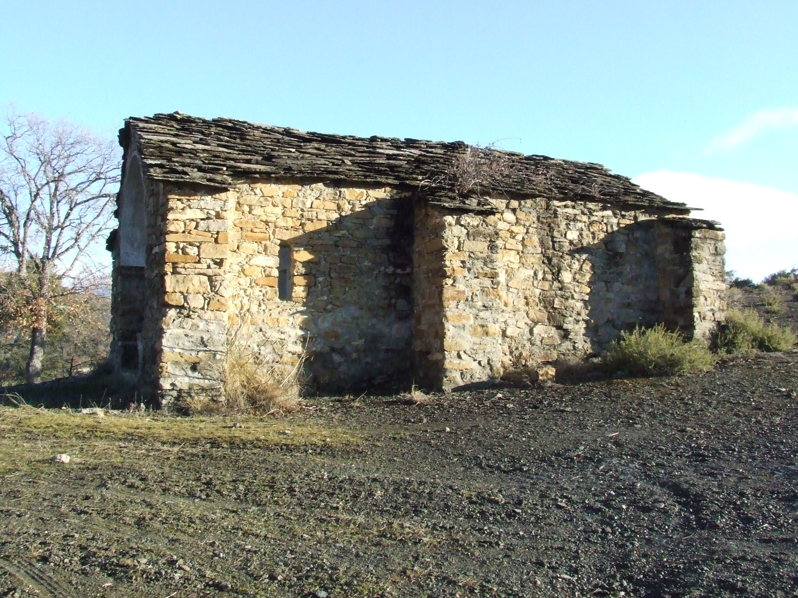 Ermita de Sant Pere Màrtir d'Eroles (Fígols de Tremp, Tremp, Pallars Jussà)